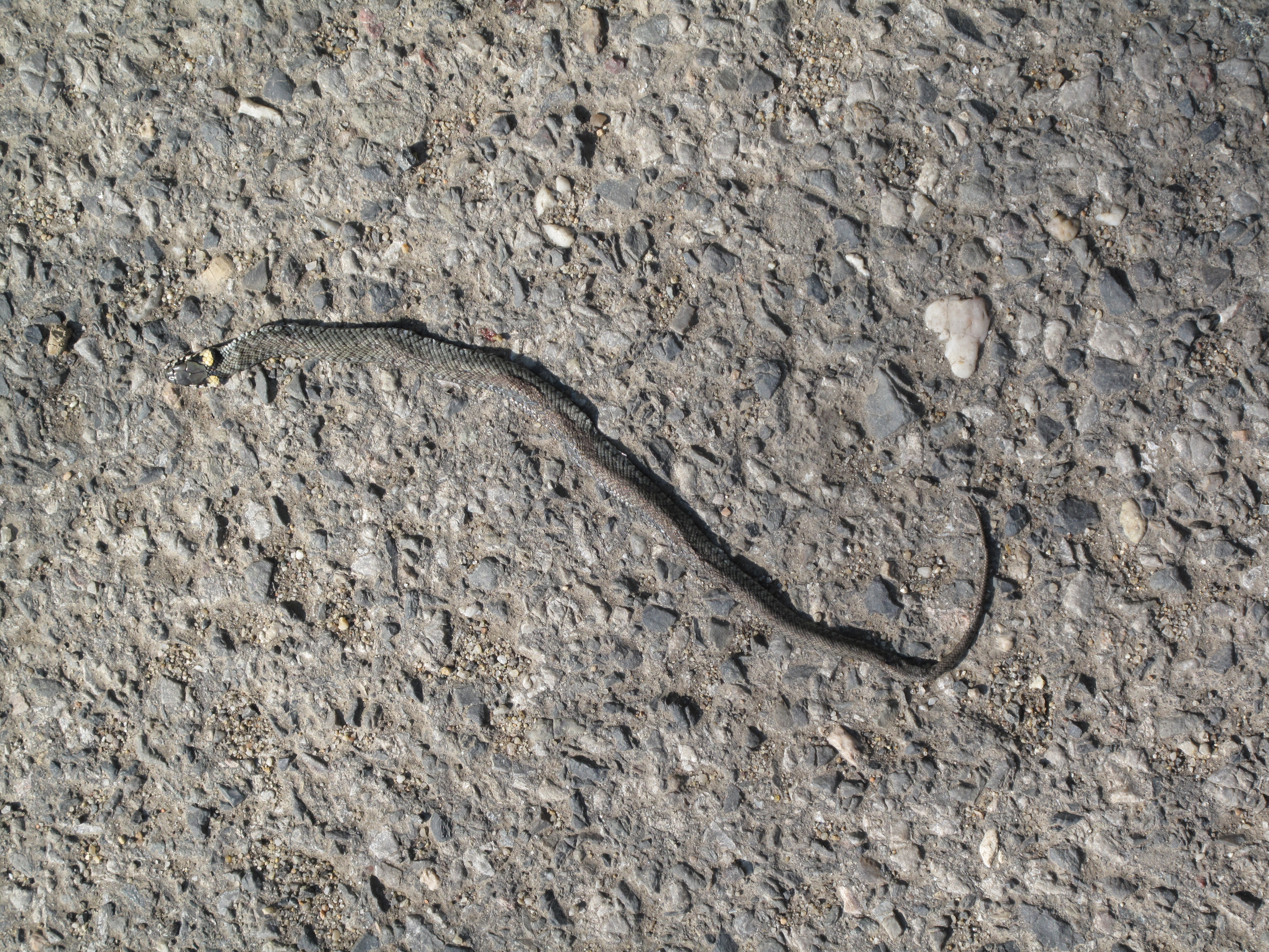 mrtvá mladá užovka